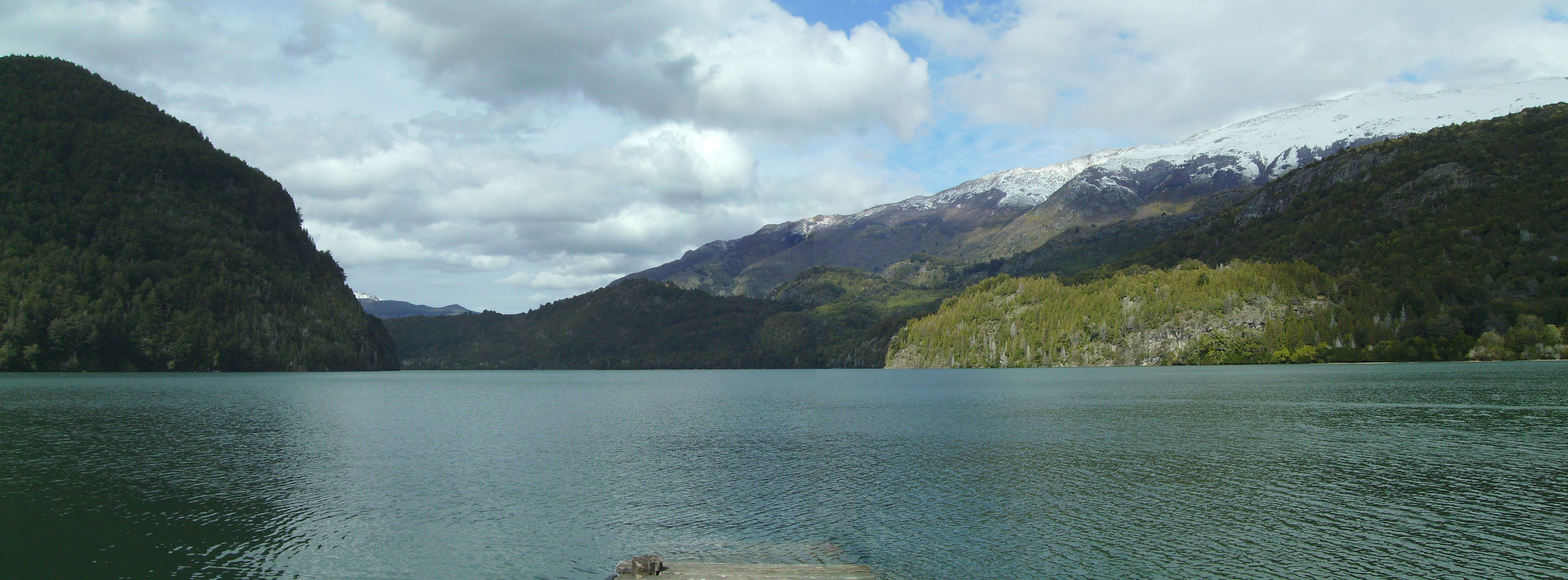 Lago Verde - Parque Nacional Los Alerces - Chubut - Argentina